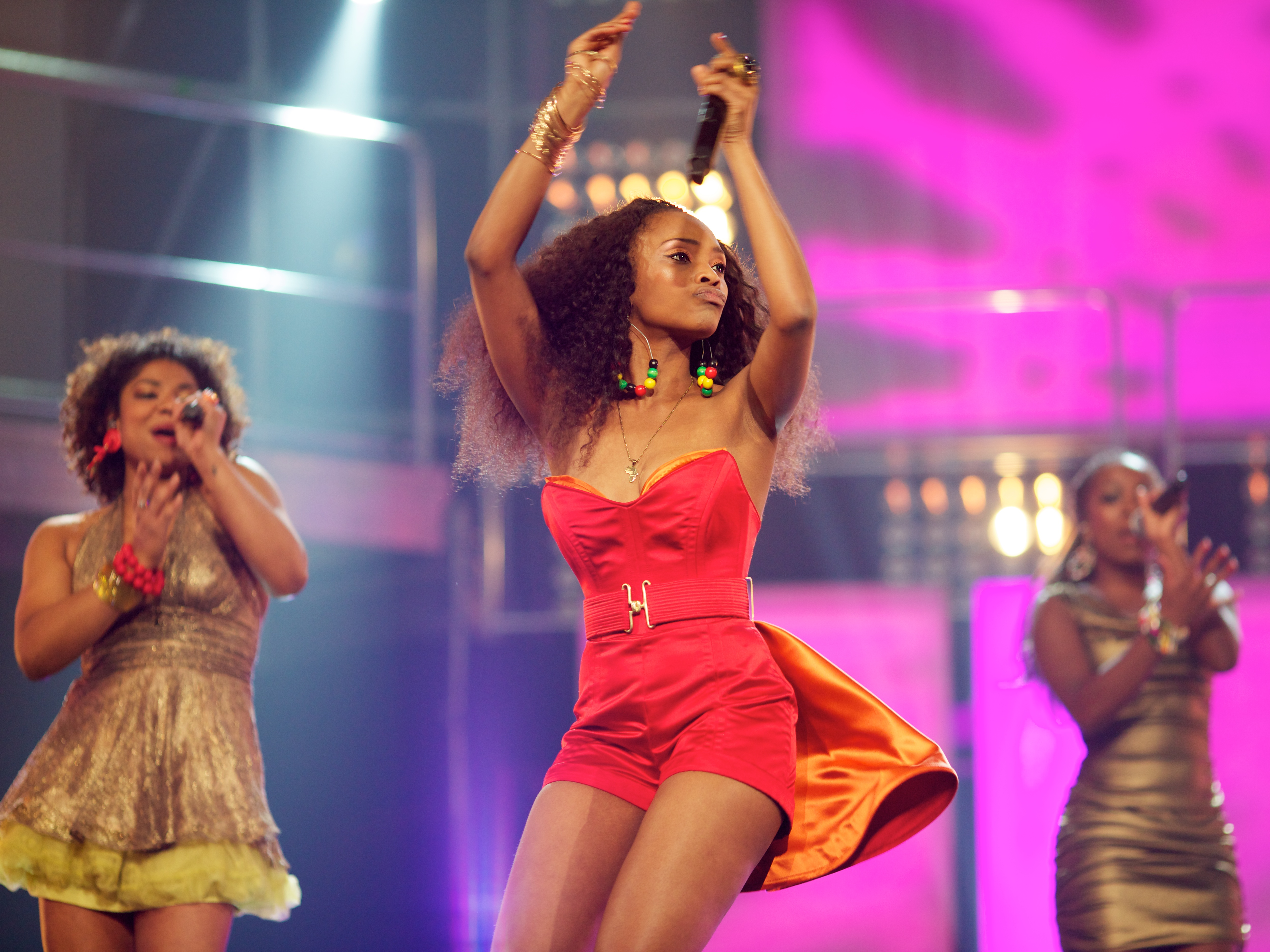 Stella Mwangi i Melodi Grand Prix 2011, Skien